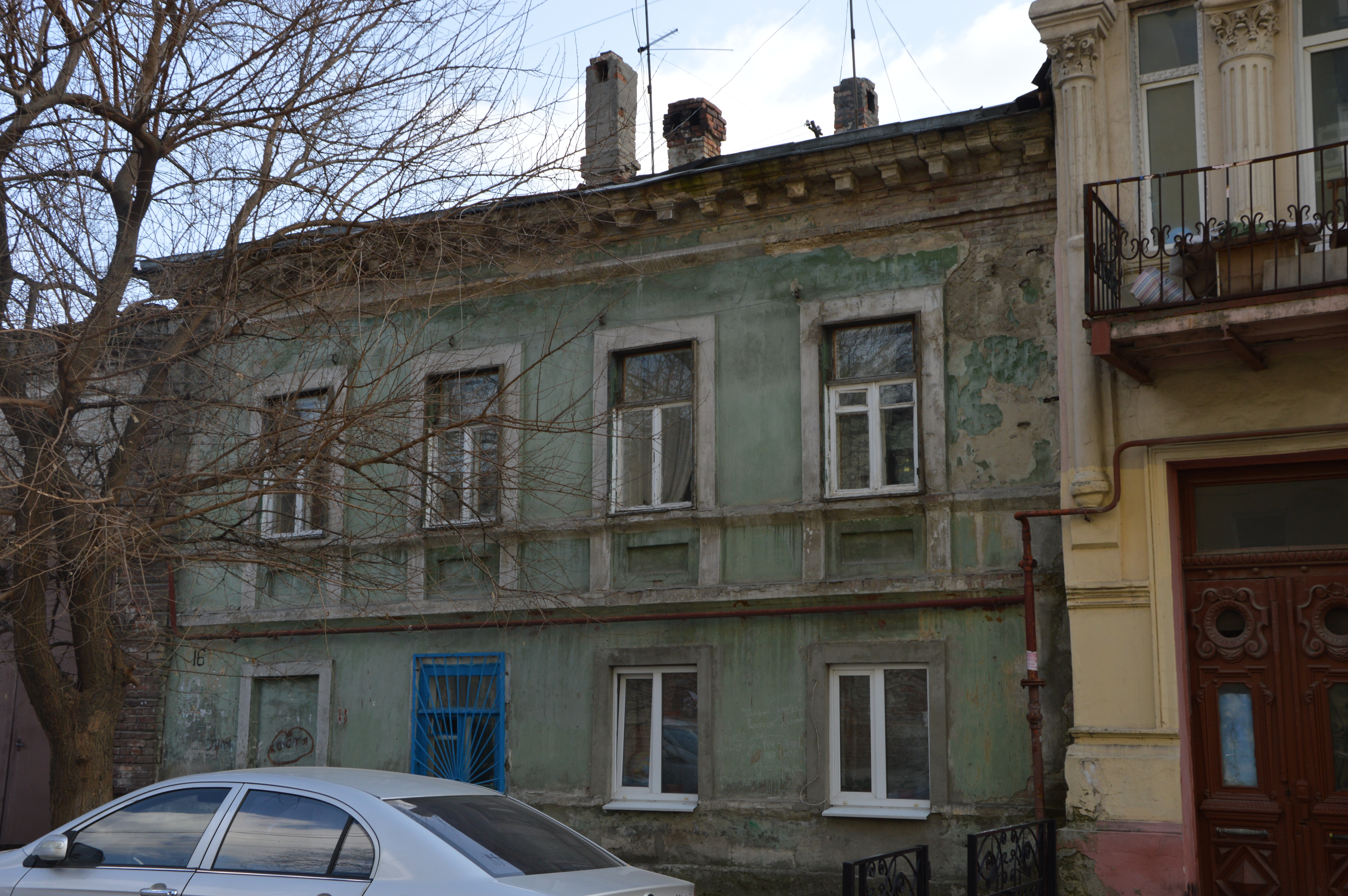 Здание города Ростова-на-Дону